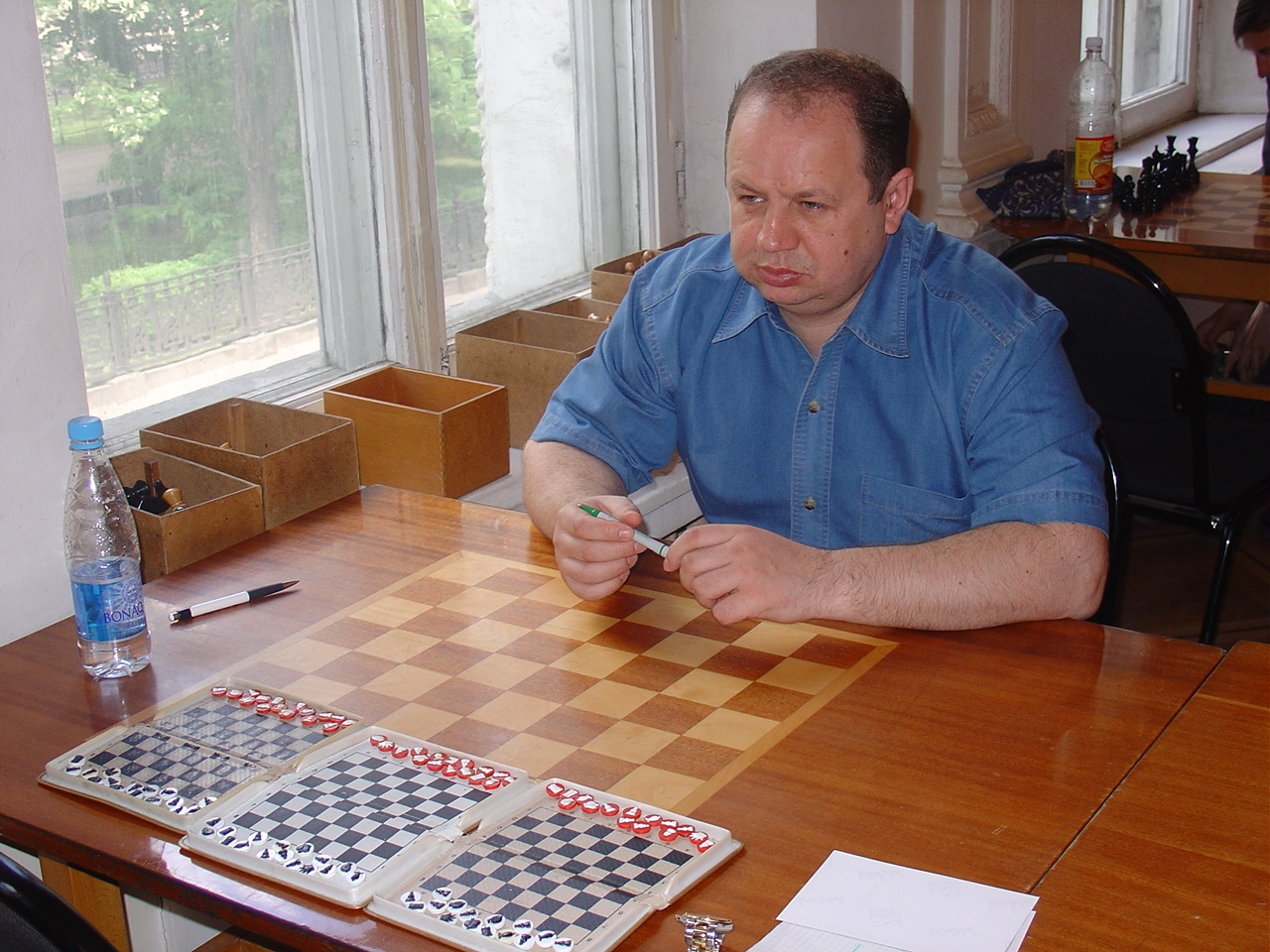 На чемпионате России 2005 года